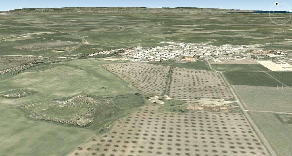 Gli scavi archeologici e il paese di Ordona.